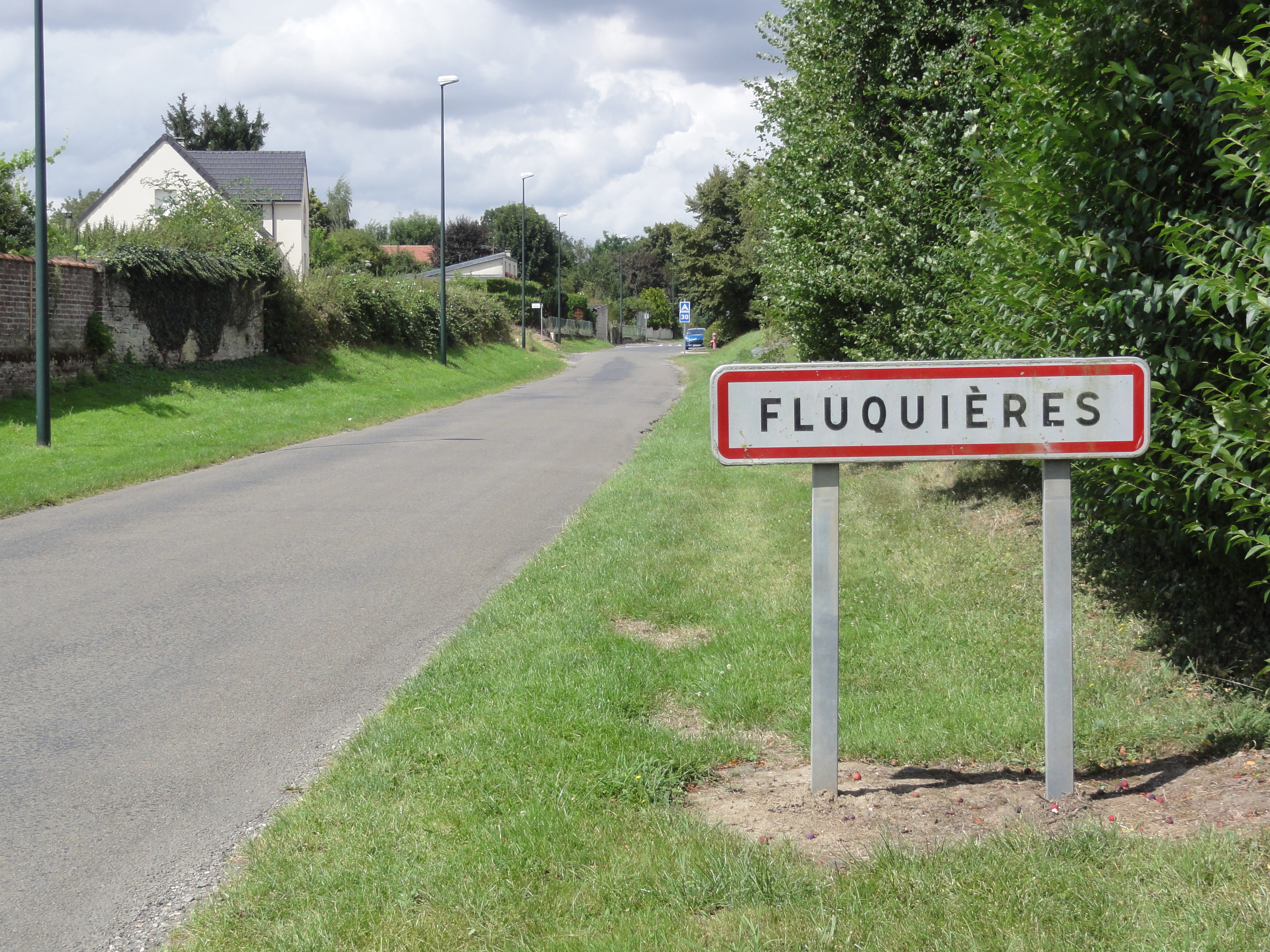 Fluquières (Aisne) city limit sign